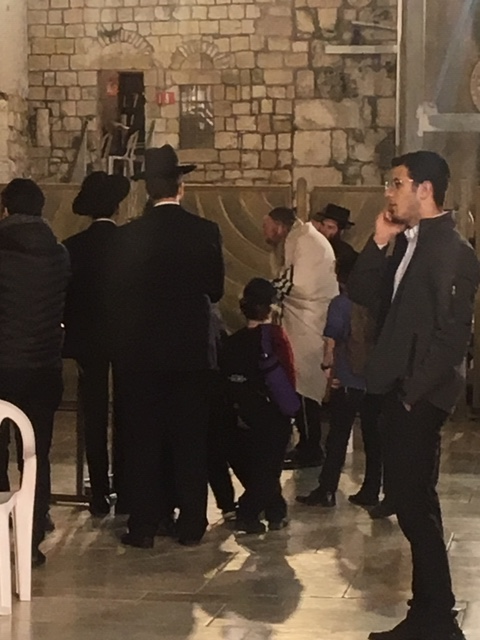 הרב יעקב עדס בתפילת ערבית בכותל המערבי